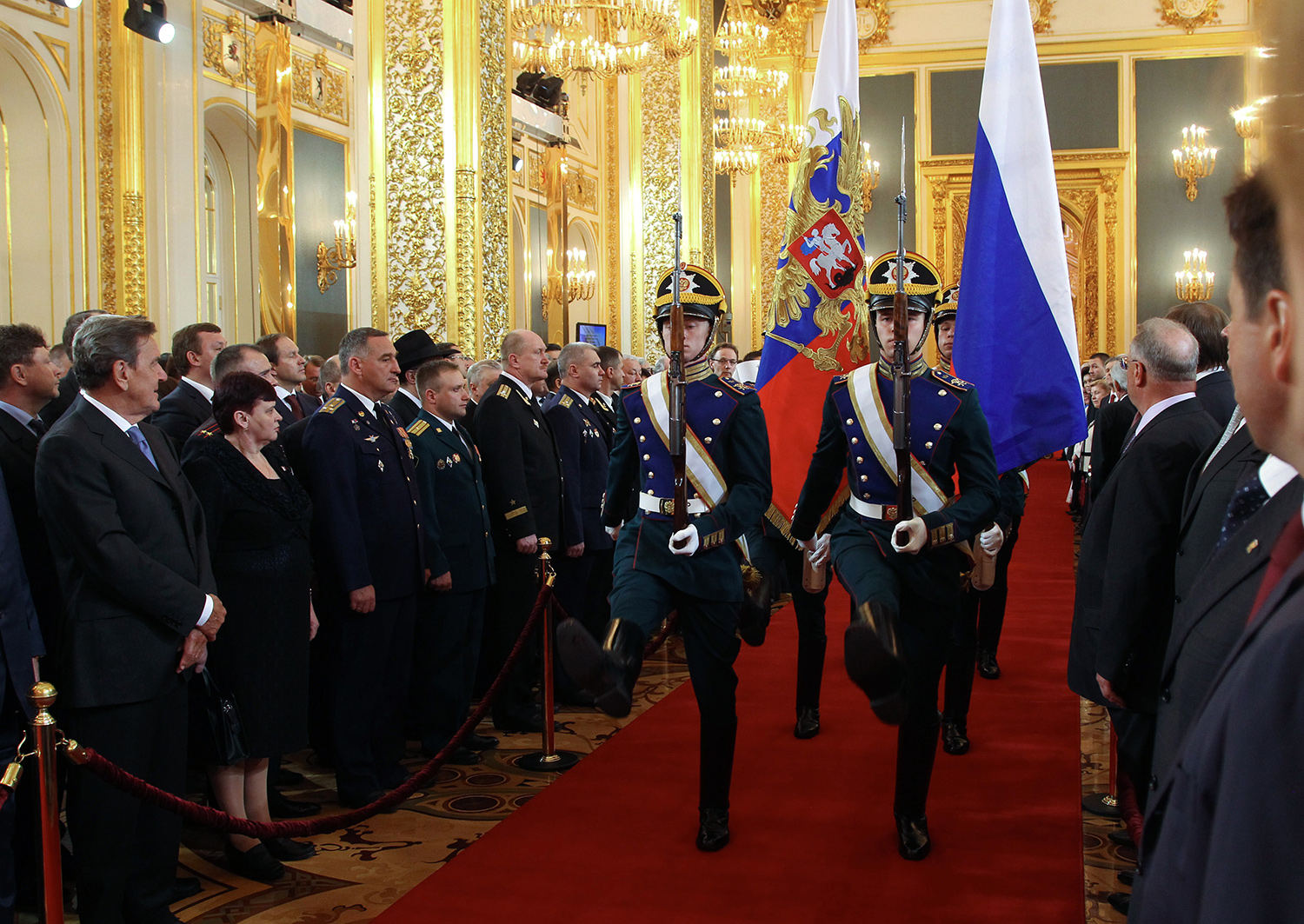 La ceremonia de inauguración de Vladímir Putin como Presidente de Rusia.